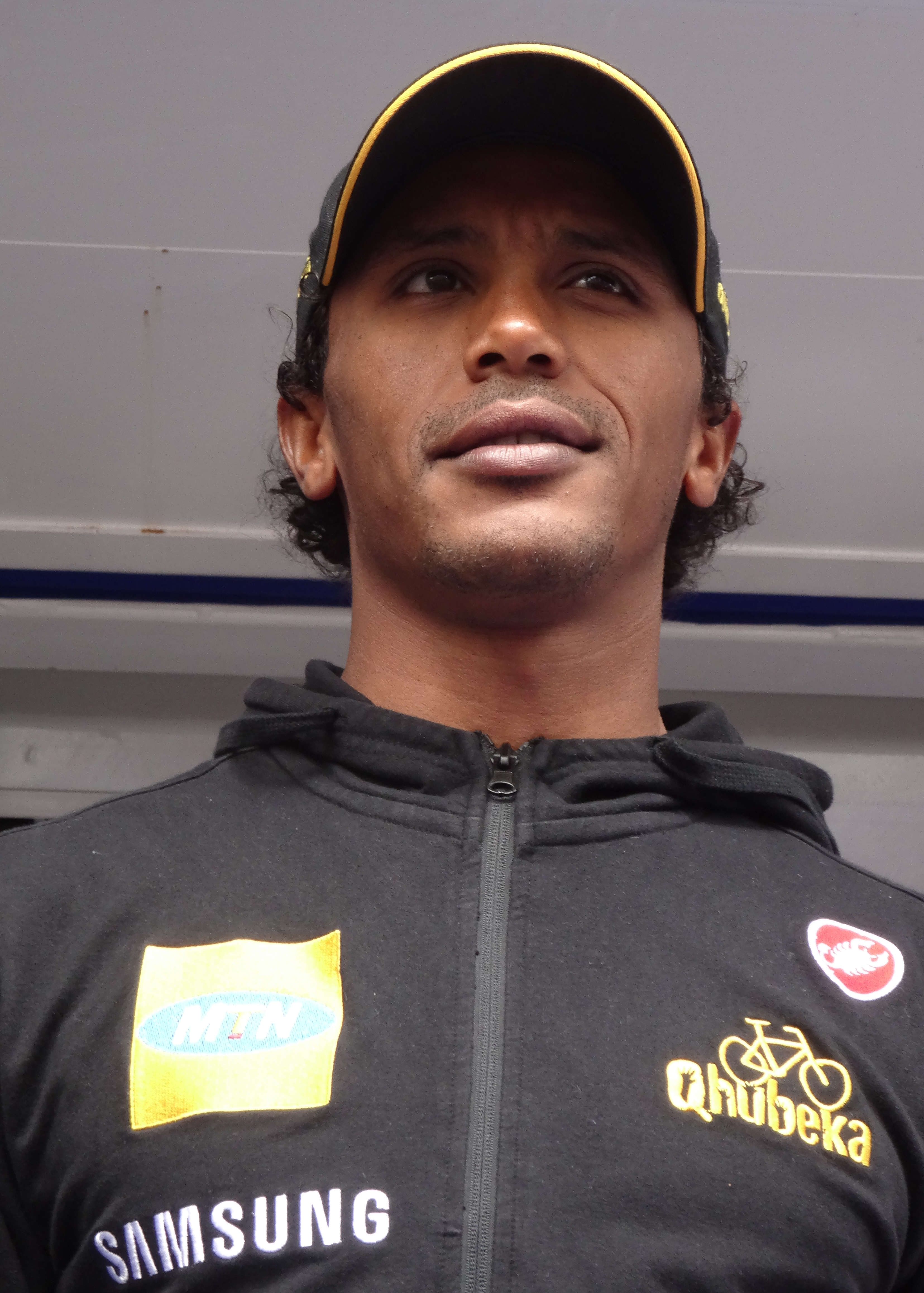 Reportage photographique réalisé le mercredi 7 mai 2014 au départ de la première étape de l'édition 2014 des Quatre jours de Dunkerque à Dunkerque, Nord, Nord-Pas-de-Calais, France. Depicted person: Fregalsi Debesay Depicted team: MTN-Qhubeka